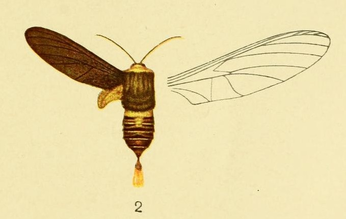 Paramelisa lophura